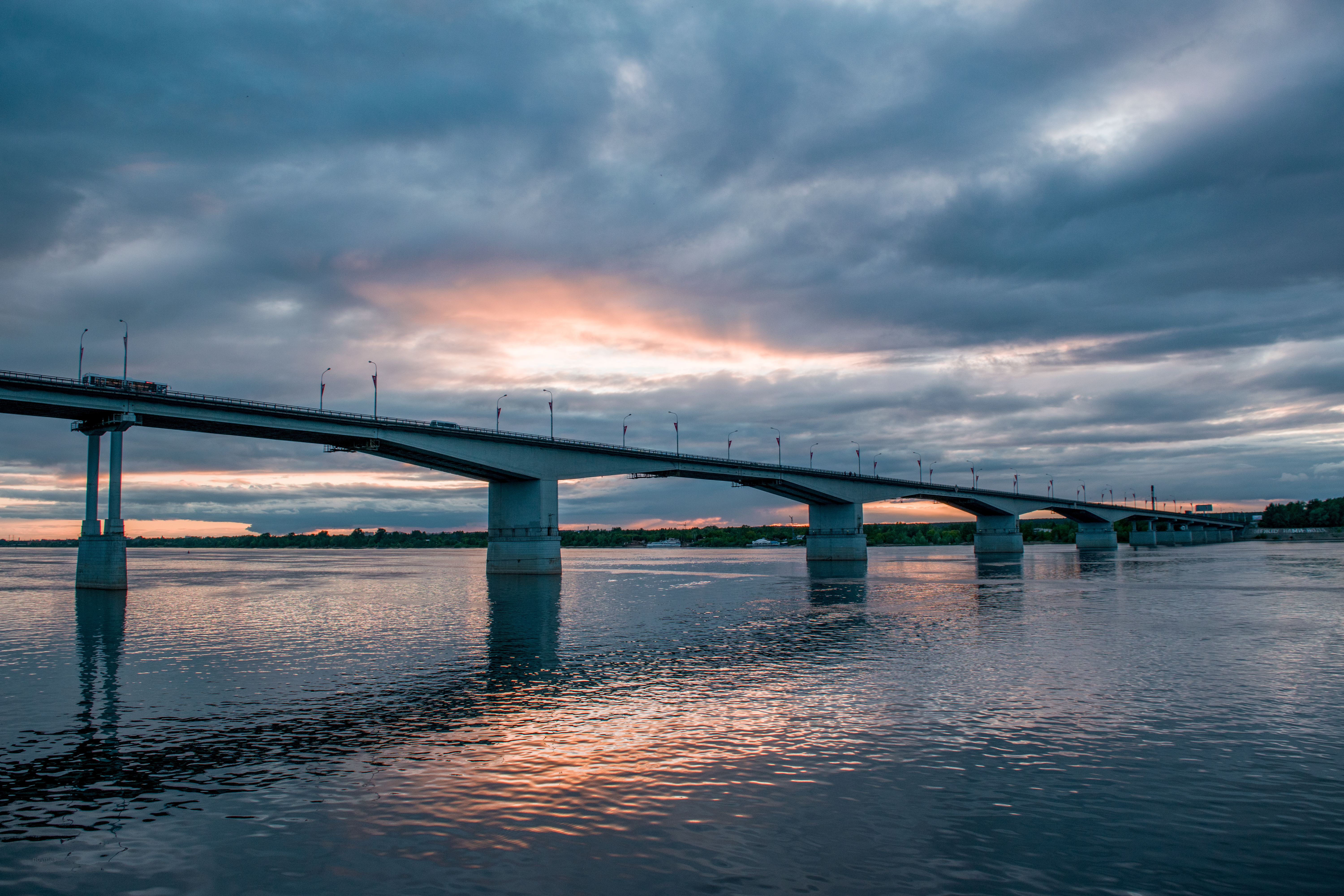 Коммунальный мост на закате, вид с набережной